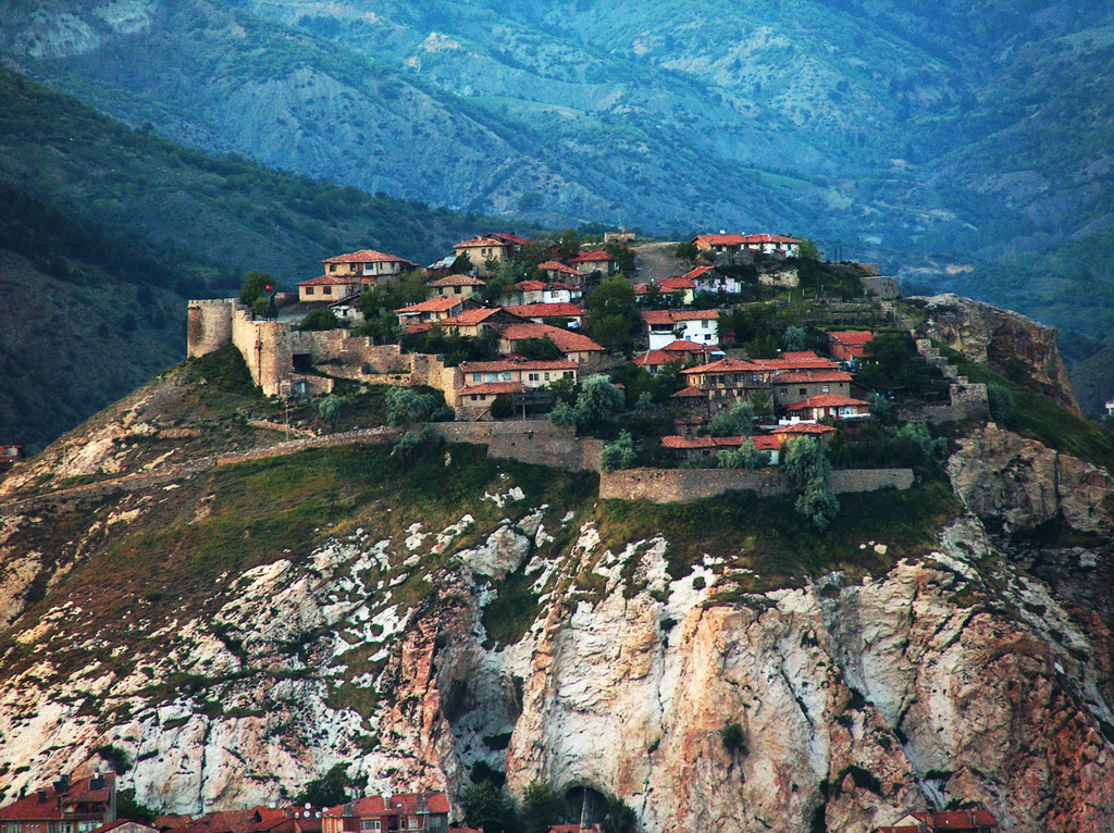 En iyi açıdan ve yükseltiden İskilip Kalesi